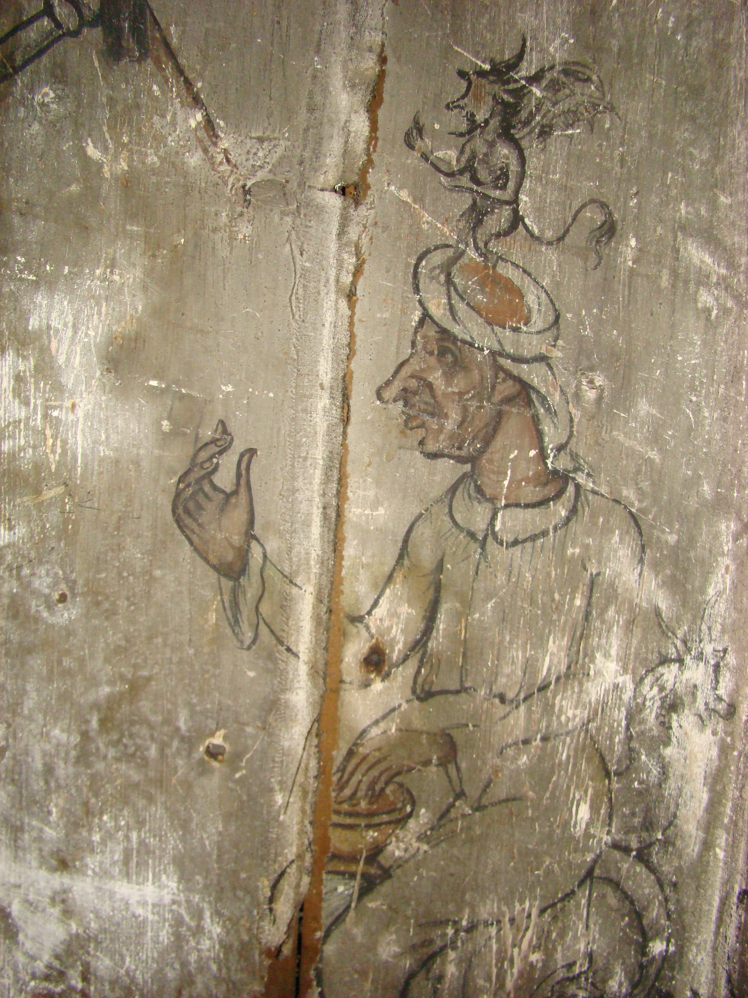 Biserica de lemn "Sfântul Dumitru" , sat DUBEŞTI; comuna OHABA LUNGĂ